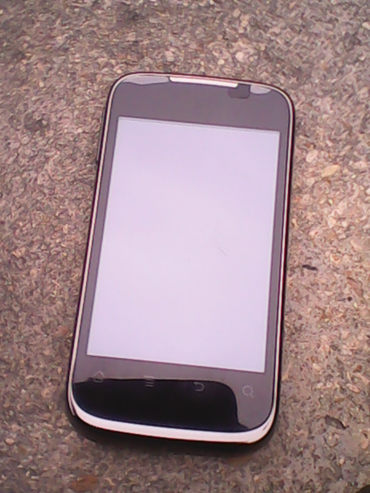 华为C8650手机